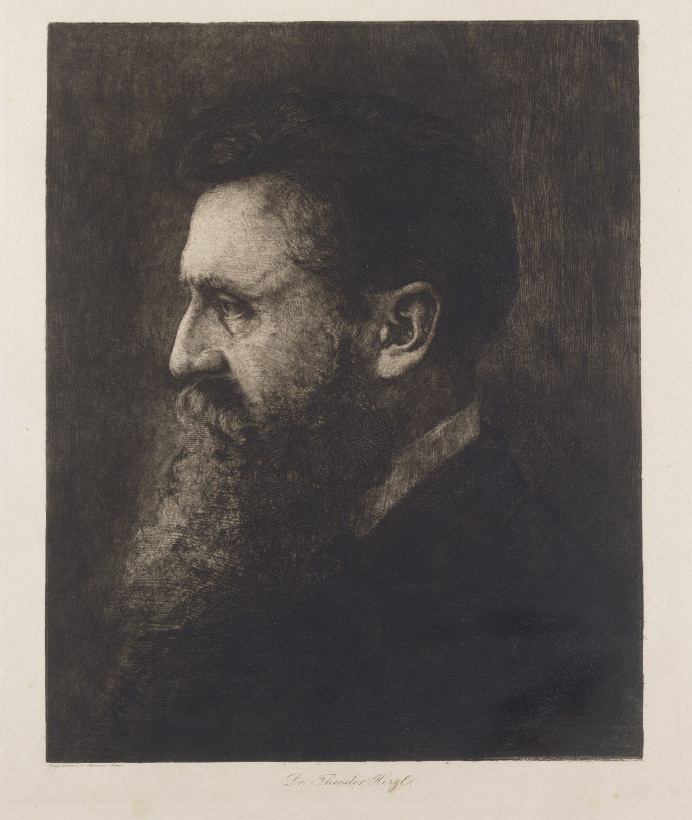 Artwork by Hermann Struck Dargestellte Person: Herzl, Theodor (1860 - 1904), DNB-Link Datierung Display: 1903 Objektart: Radierung, Vernis mou Schlagworte Inhalt /Geografie: Mann, Porträt, Originalgrafik Schlagworte Kontext: Politiker, Zionismus, Personenkult